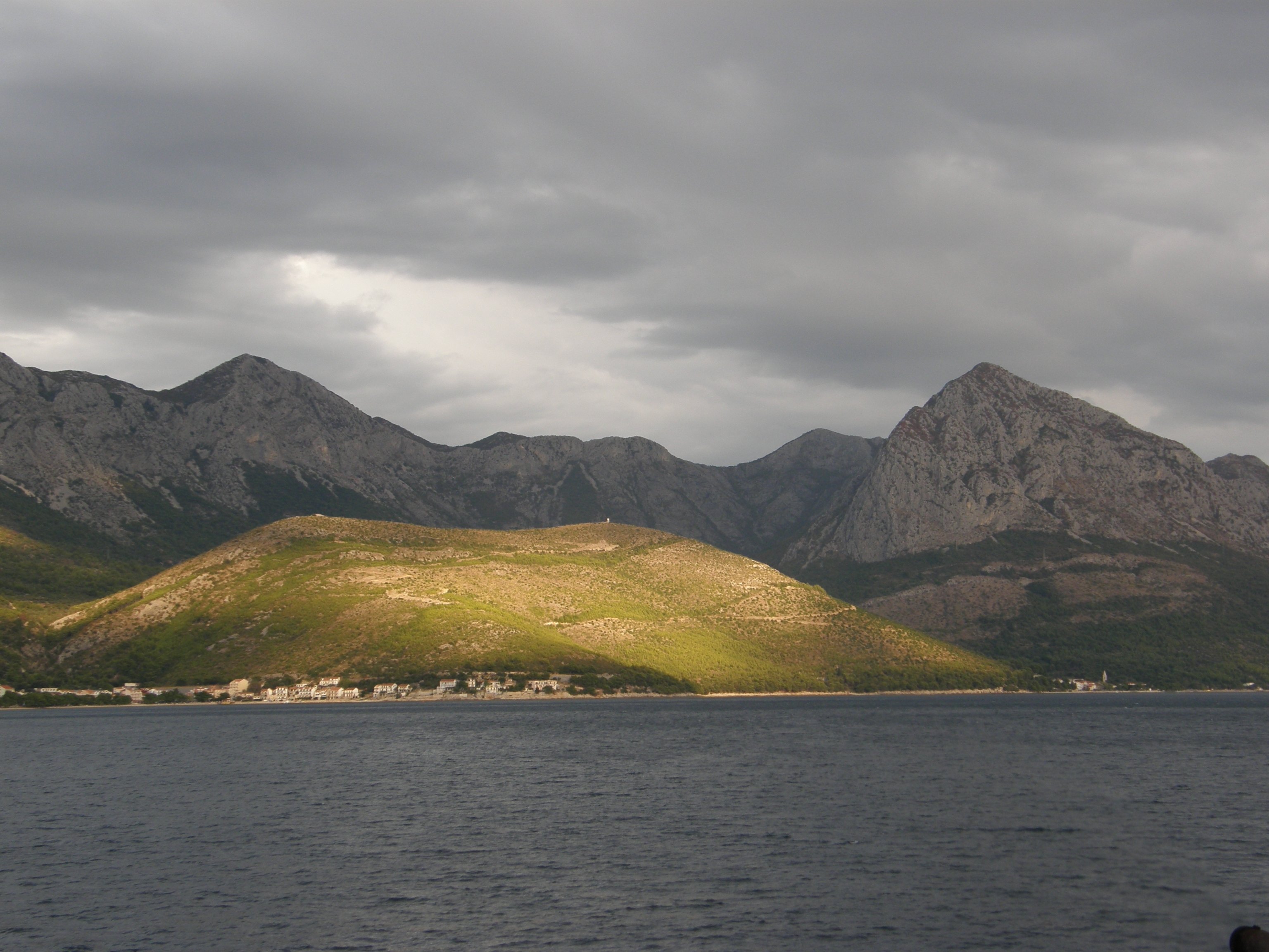 Biokovo